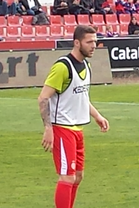 Jugador del Girona FC